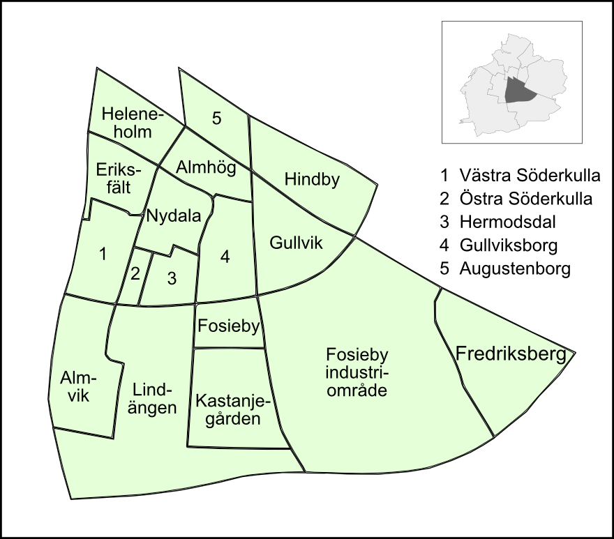 Delområden i Fosie, Malmö 2009